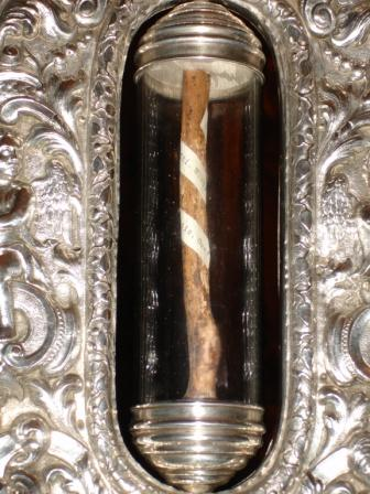 Relíquia de l'húmer de Sant Miquel dels Sants a la capella de la seva casa natal a Vic